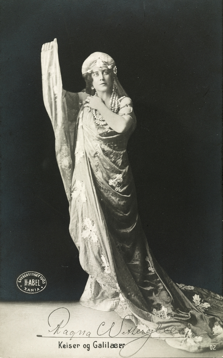 Ragna Wettergreen som Fyrstinne Helena i "Keiser og Galilæer" på Nationaltheatret, stående helfigur, kostyme.